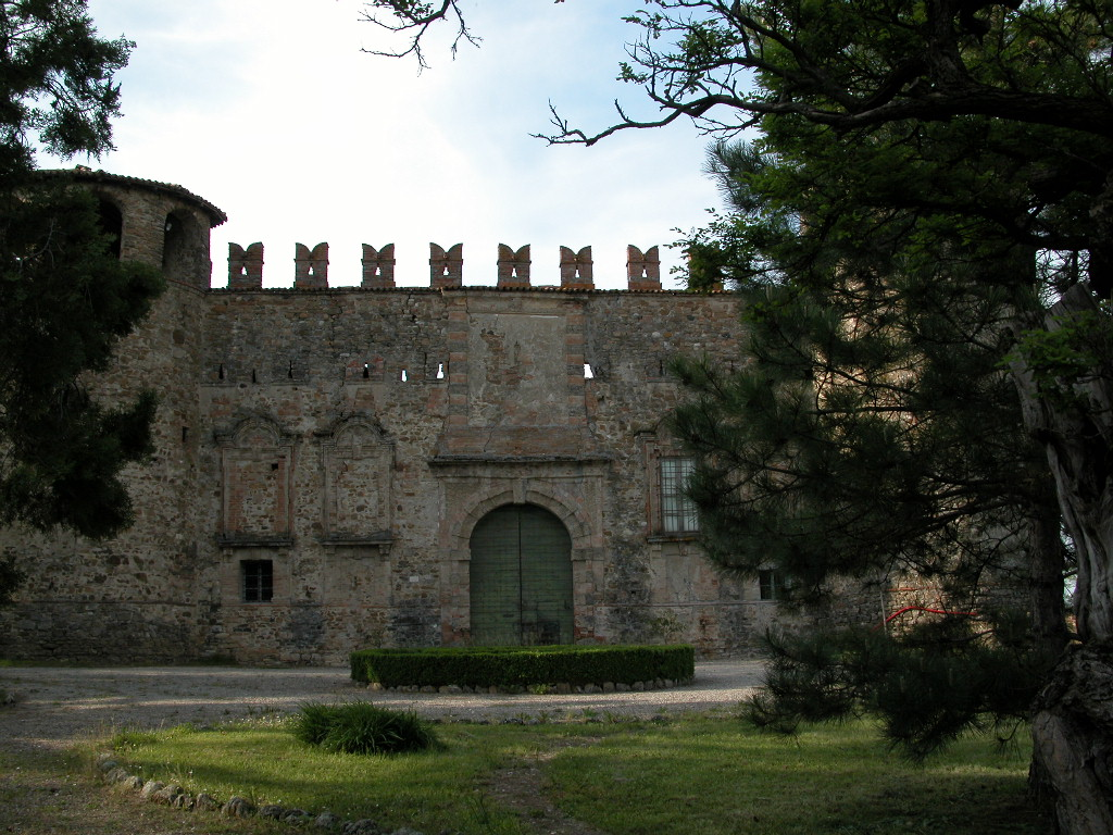 Foto mia personale, entrata del castello di Statto, 2008